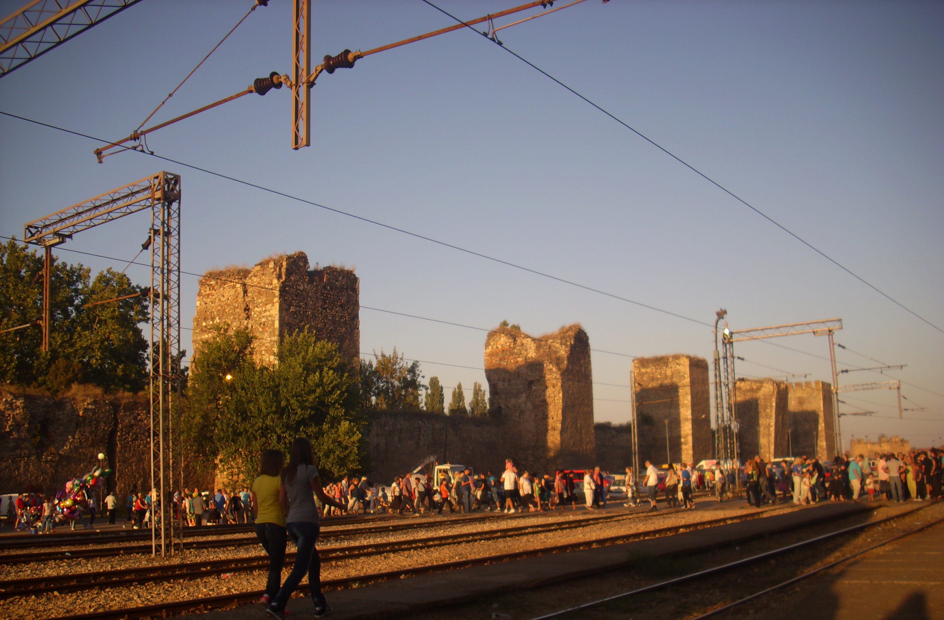 Pogled sa železničke stanice na zidine Smedervske tvrđave